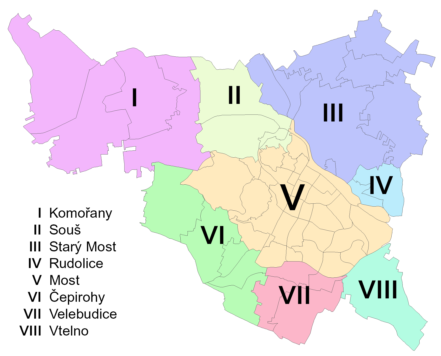 Rozložení městských částí Mostu.